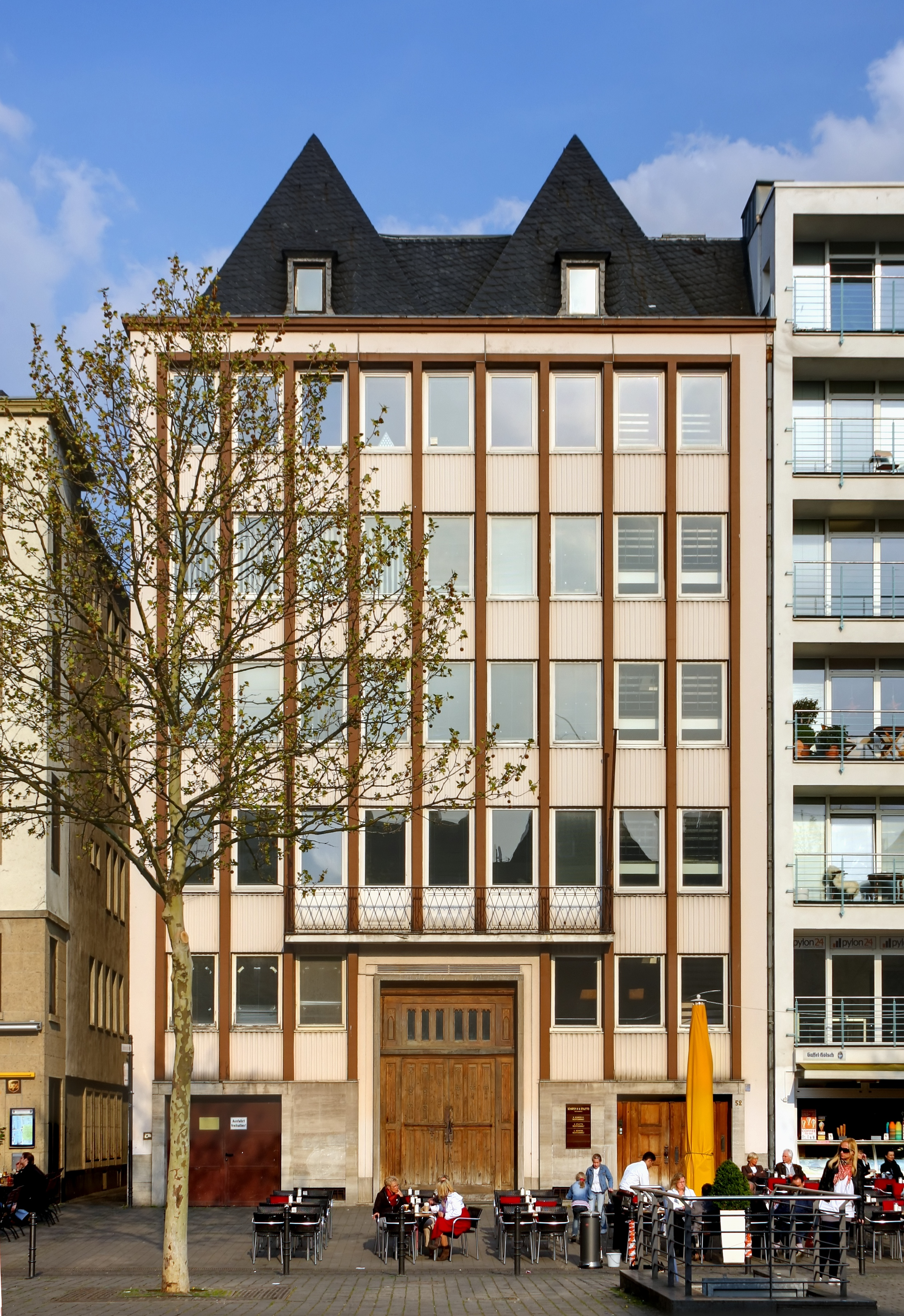 Denkmalgeschütztes Geschäftshaus, Heumarkt 52, Köln. Architekt Peter Prevoo, Baujahr: 1954.